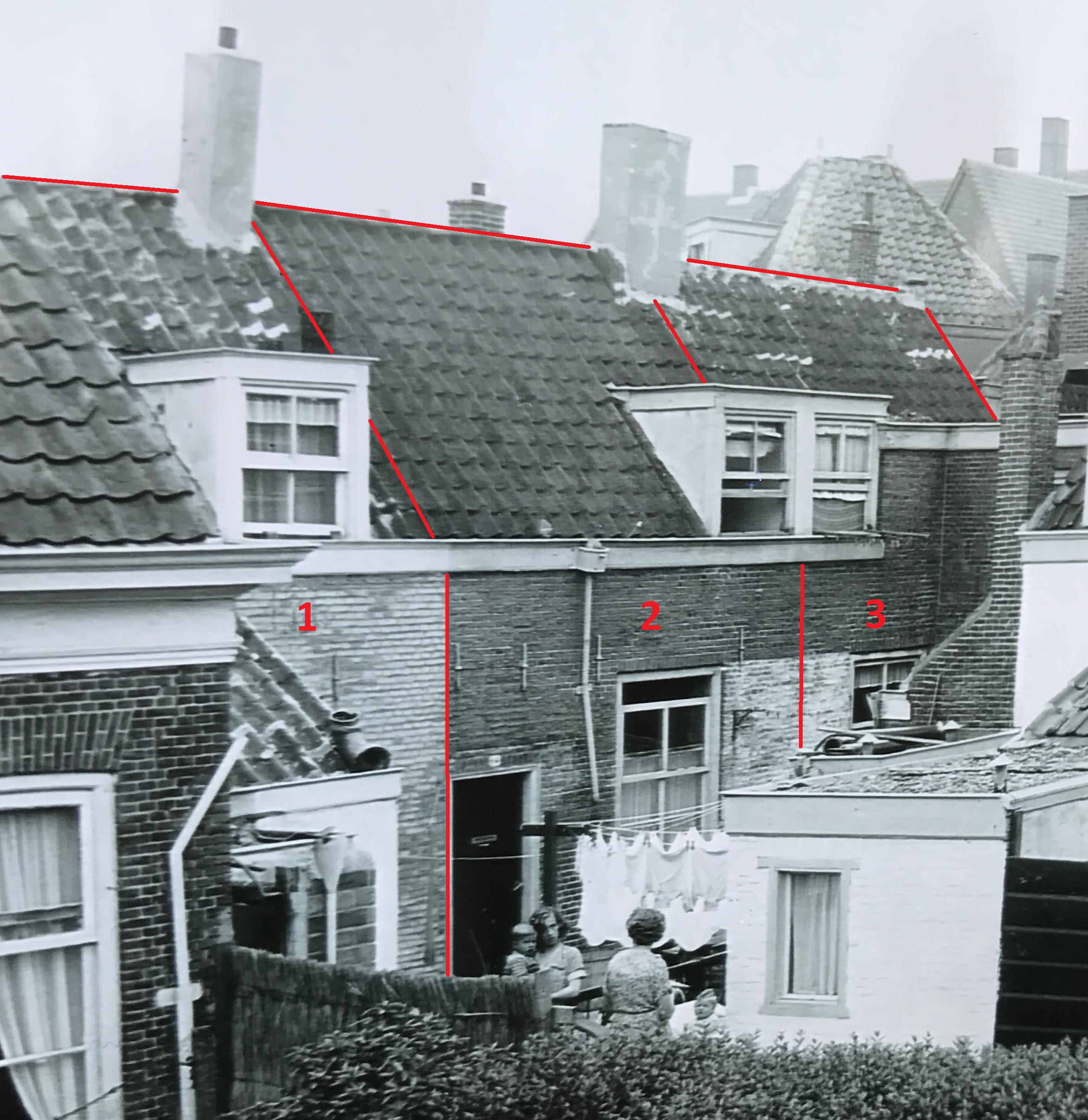 antieke foto van rond 1950(?) waarop de huisnummers 62, 64 en 66 van het hofje zijn ingetekend als 1, 2 en 3. Op de voorgrond links is nummer 60 gedeeltelijk te zien. Op de voorgrond rechts nummer 68.